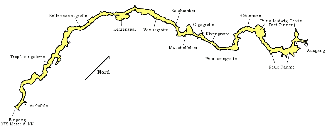 Binghöhle bei Streitberg, Grundriss